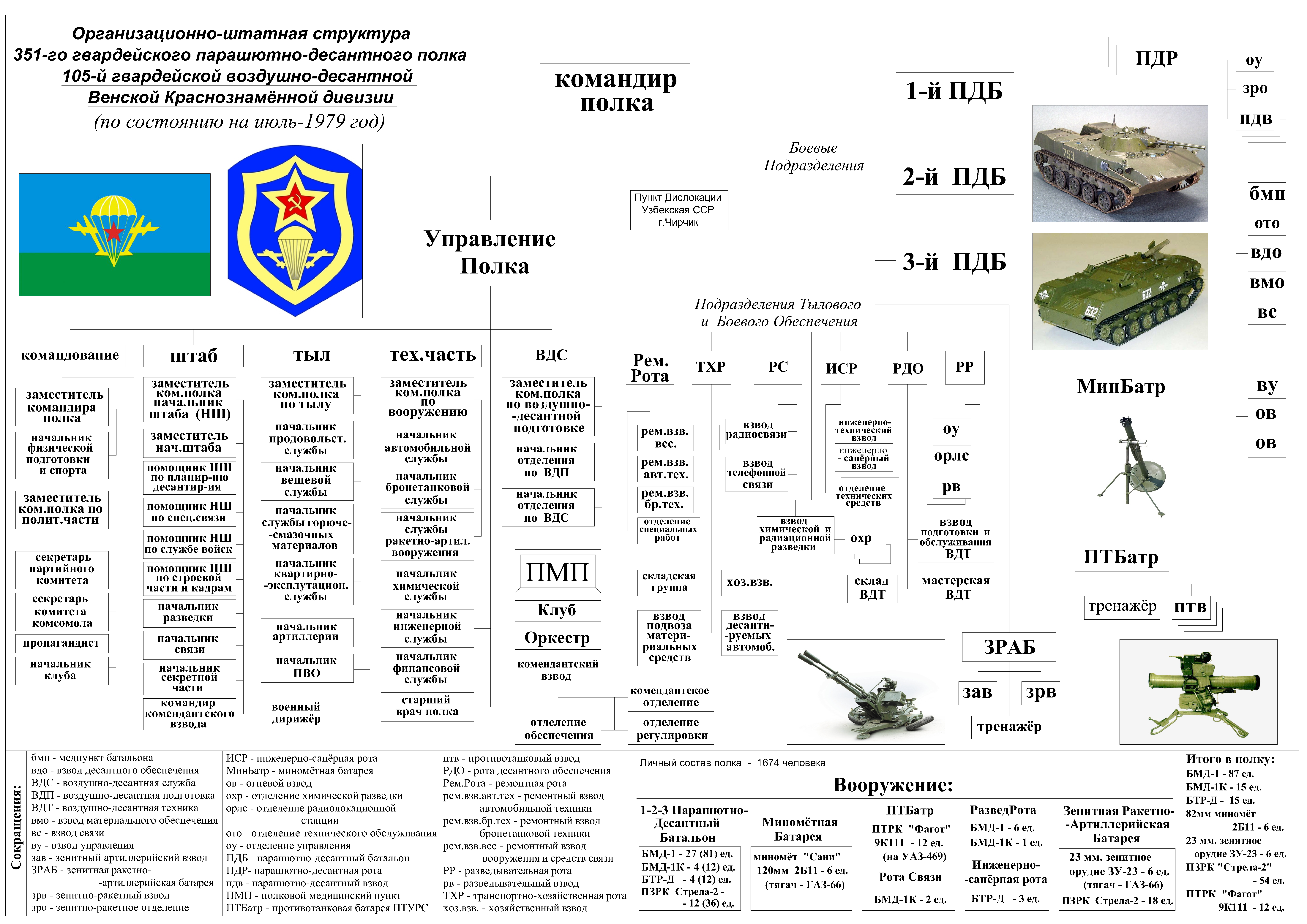 Организационно-штатная структура 351-го гвардейского парашютно-десантного полка 105-й гвардейской воздушно-десантной Венской Краснознамённой дивизии на июль-1979